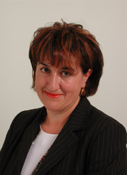 Politica italiana